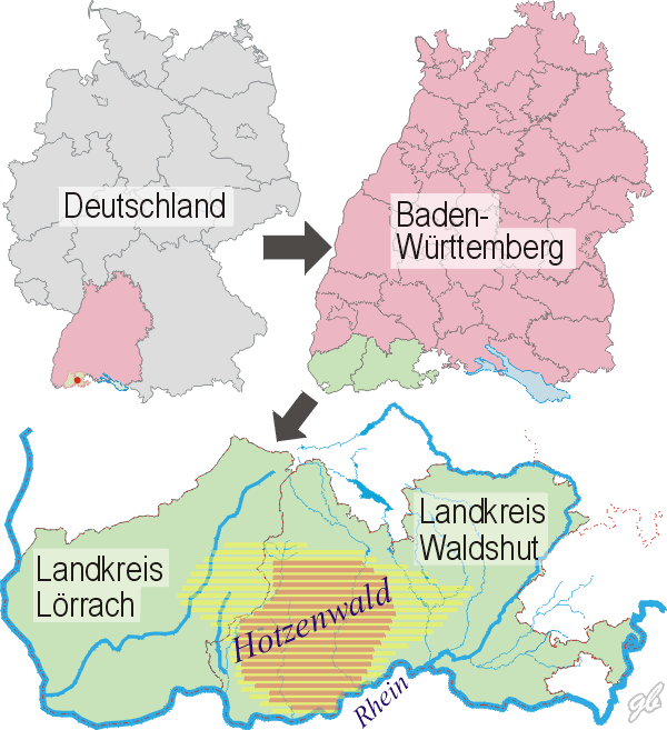 Lage des Hotzenwaldes nach einer engeren und weiteren Definition. Exakte geografische Genze sind für die Region nicht belegt.